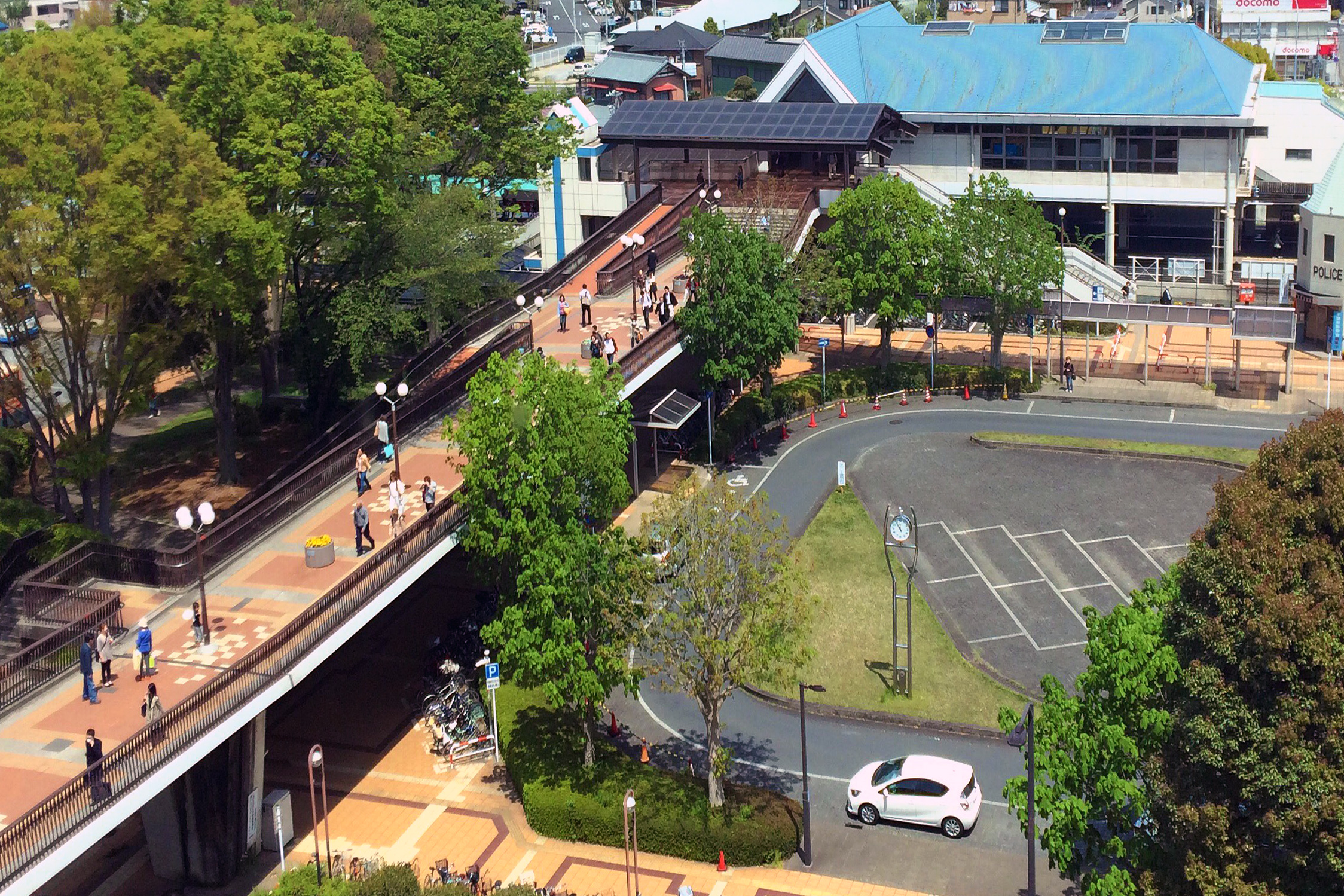 ゆみーるイオン鎌取店から撮影した鎌取駅全体